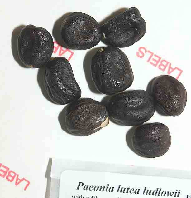 Paeonia lutea var. ludlowii seeds